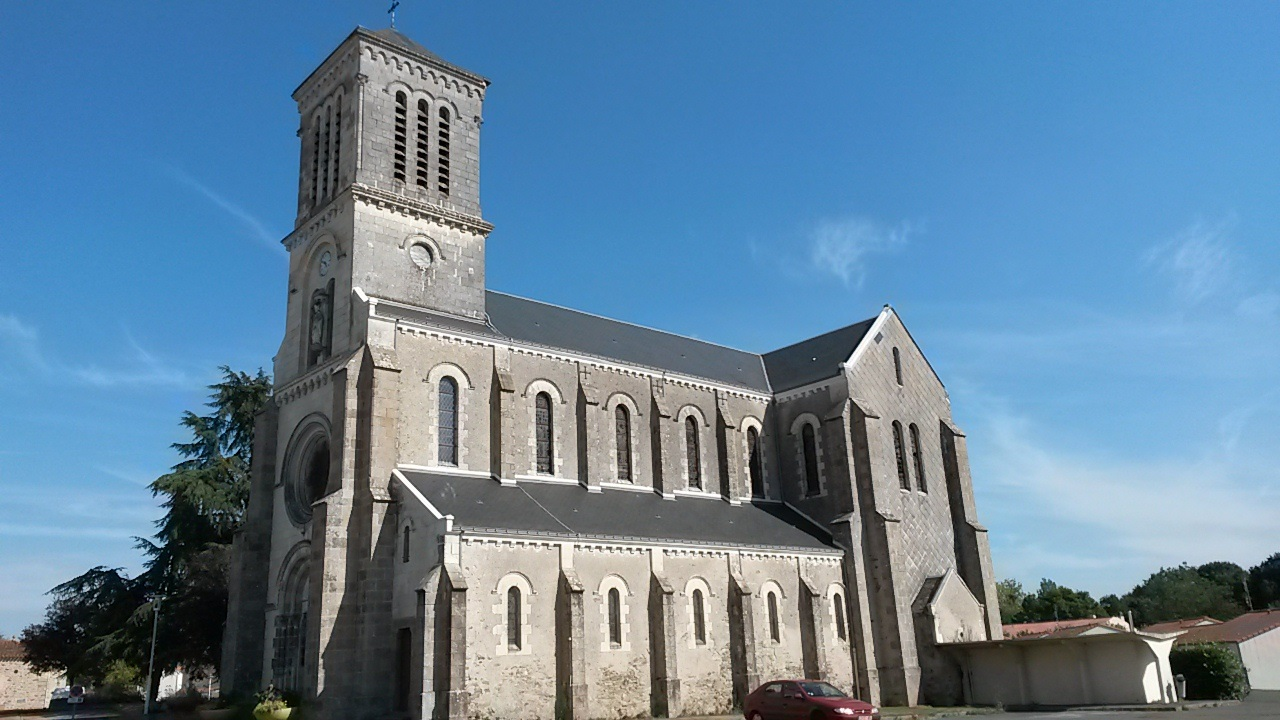 Église de Treize-Septiers - Vendée - France